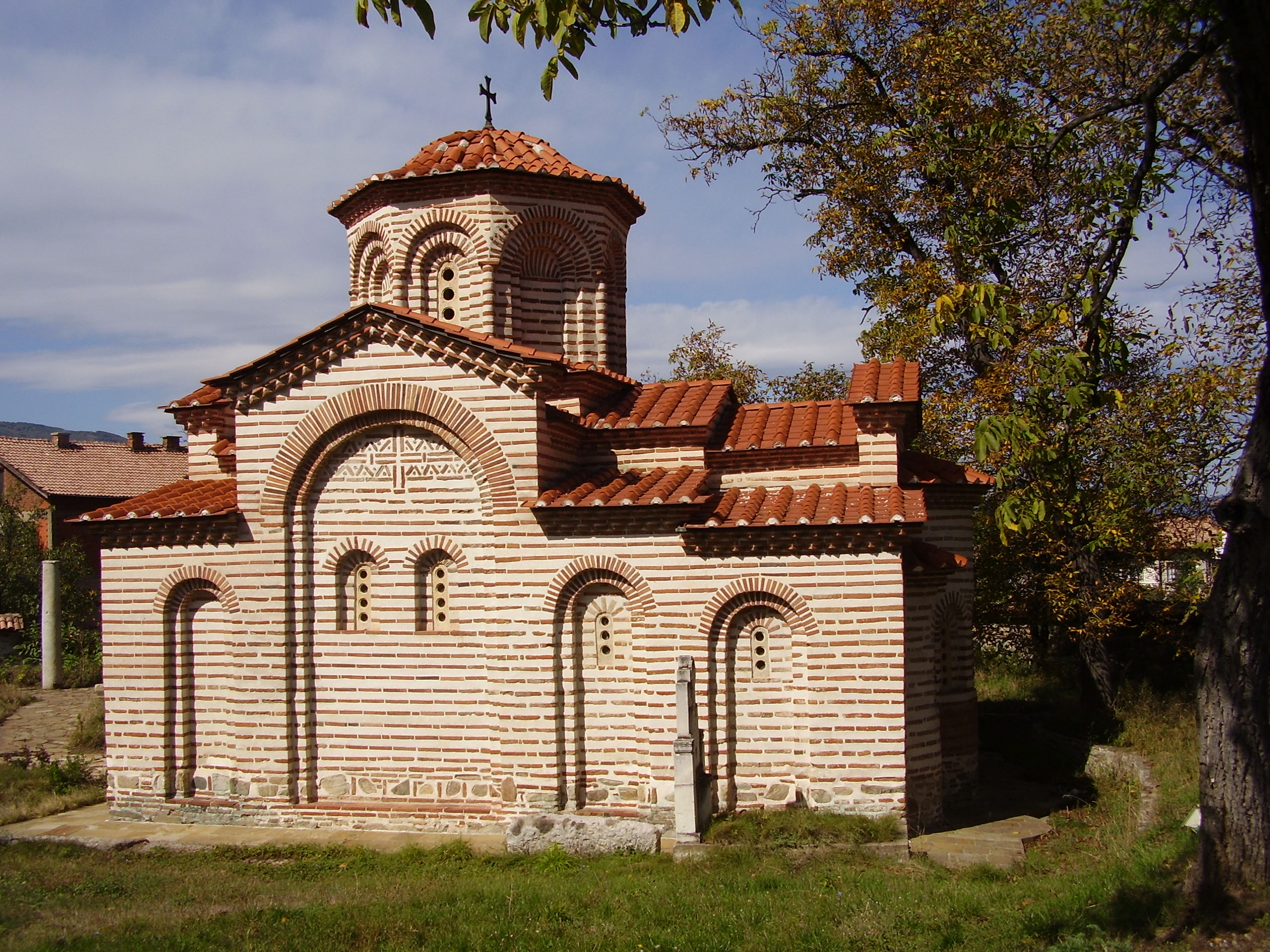 Църква "Свети Георги" - общ изглед